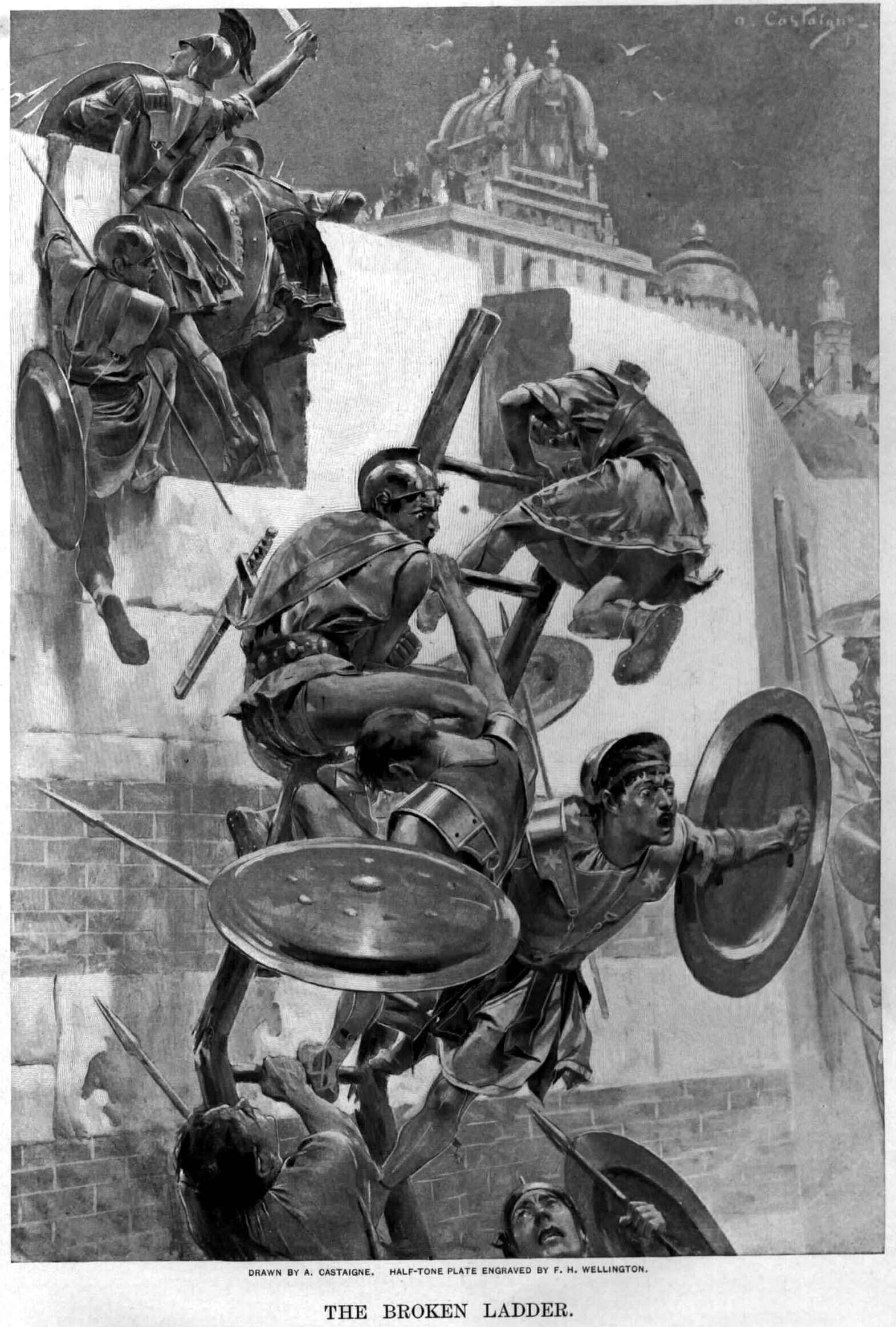 Alexander old drawings